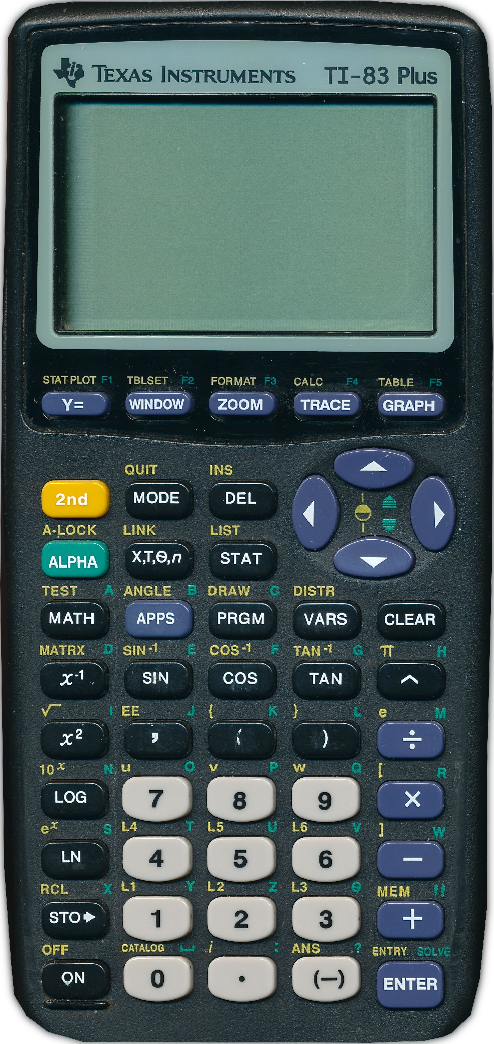 Ti 83 plus, Grafischer Taschenrechner